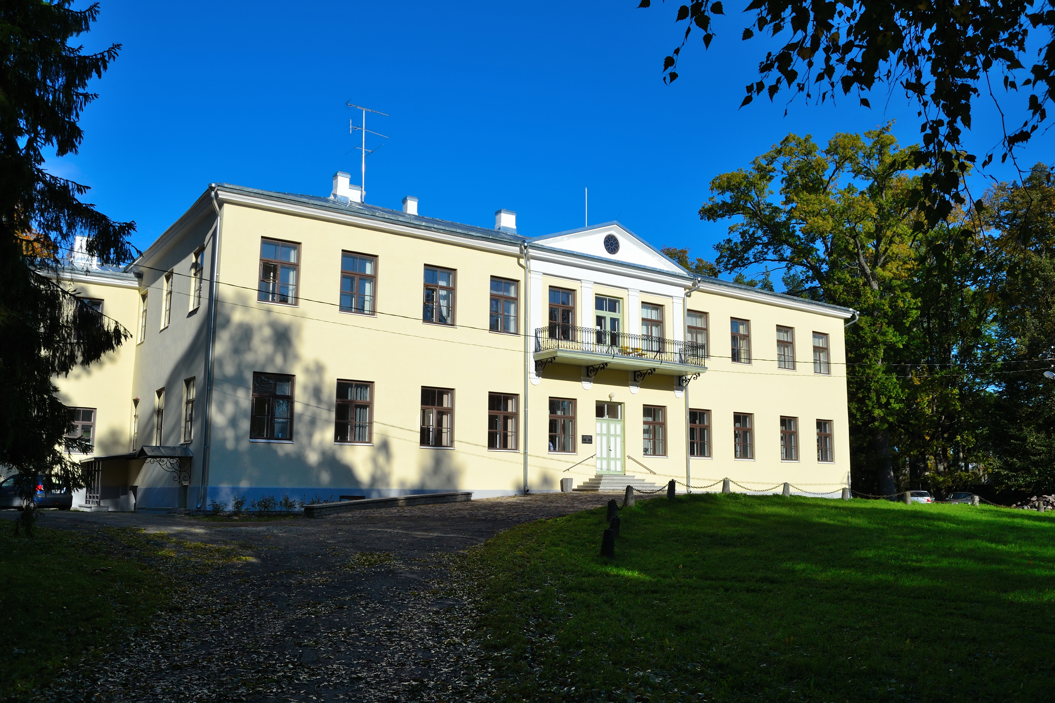 Seli mõisa peahoone